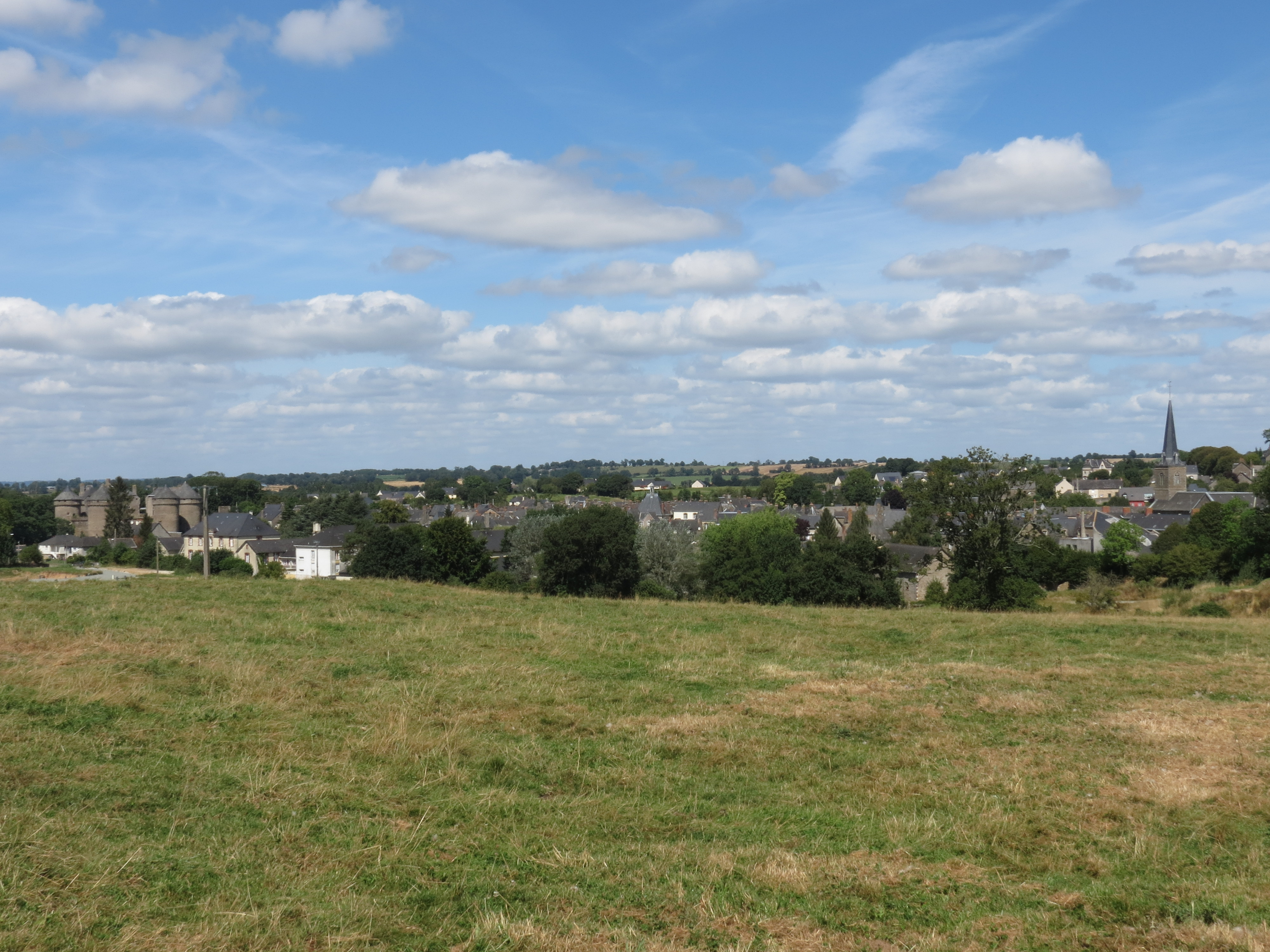 Vue générale de la ville de Lassay-les-Châteaux, en Mayenne.